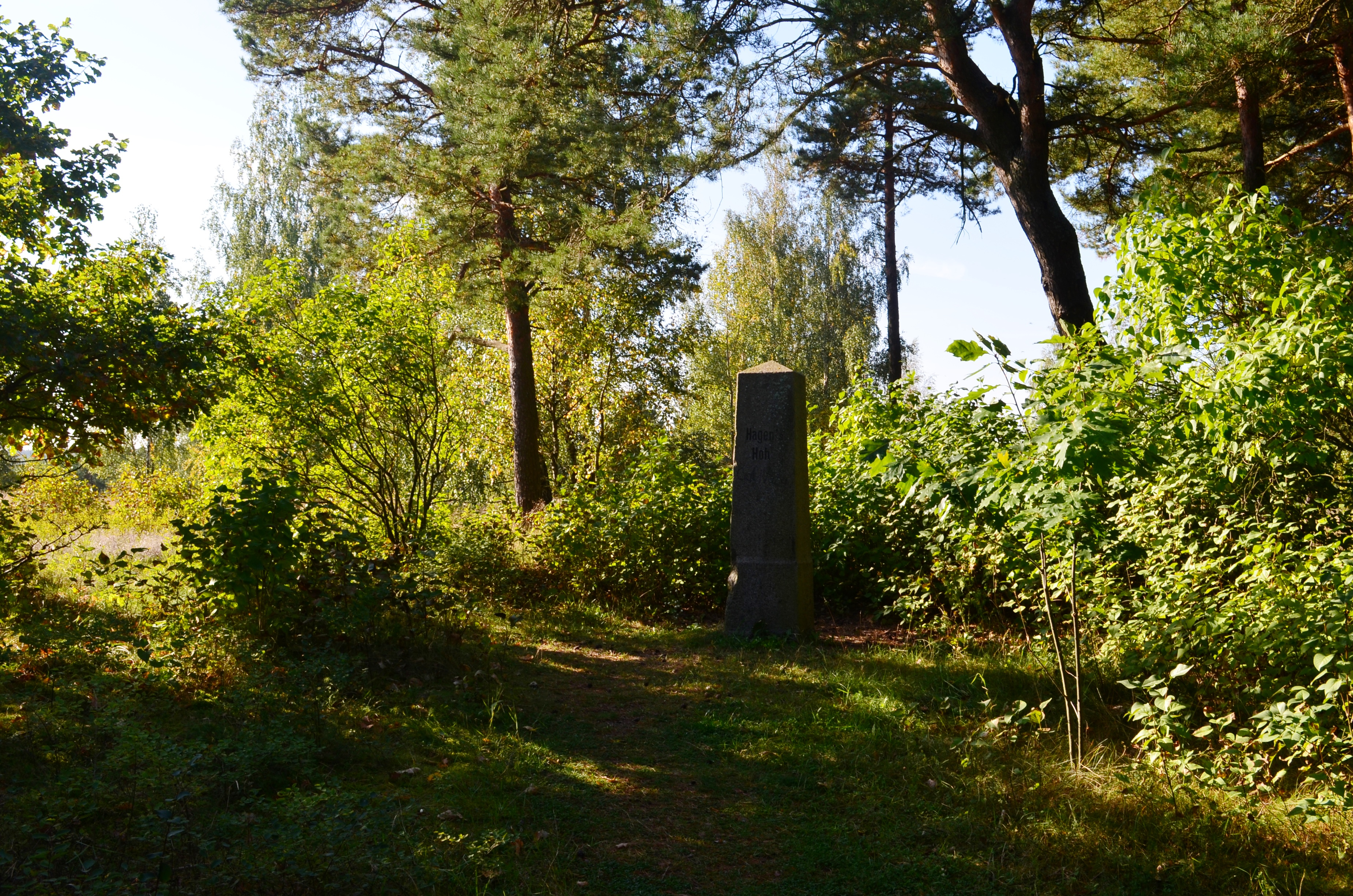 Paminklas ant Hageno kalno, Smiltynė, Klaipėda